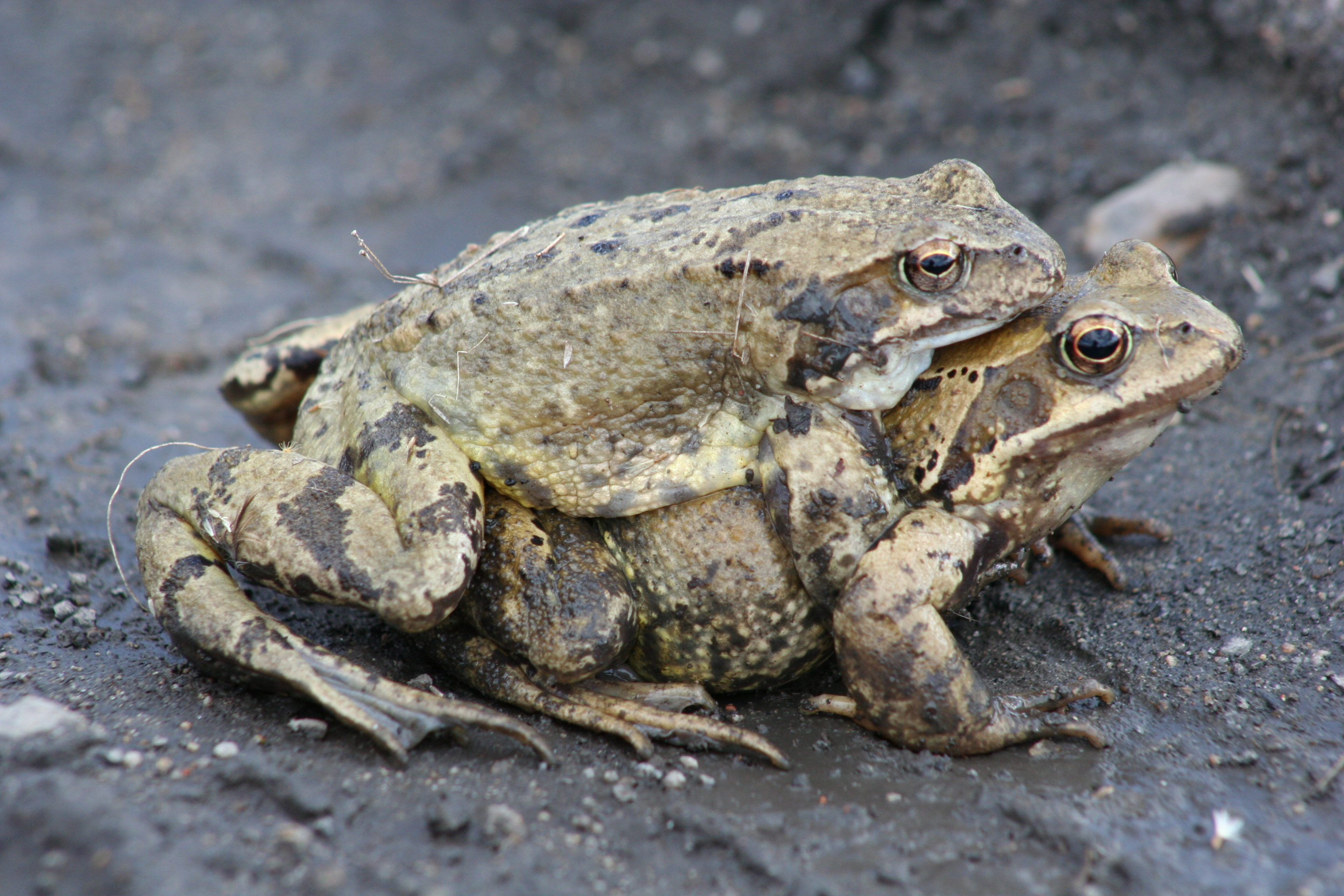 Amplexus, Ampleksus.